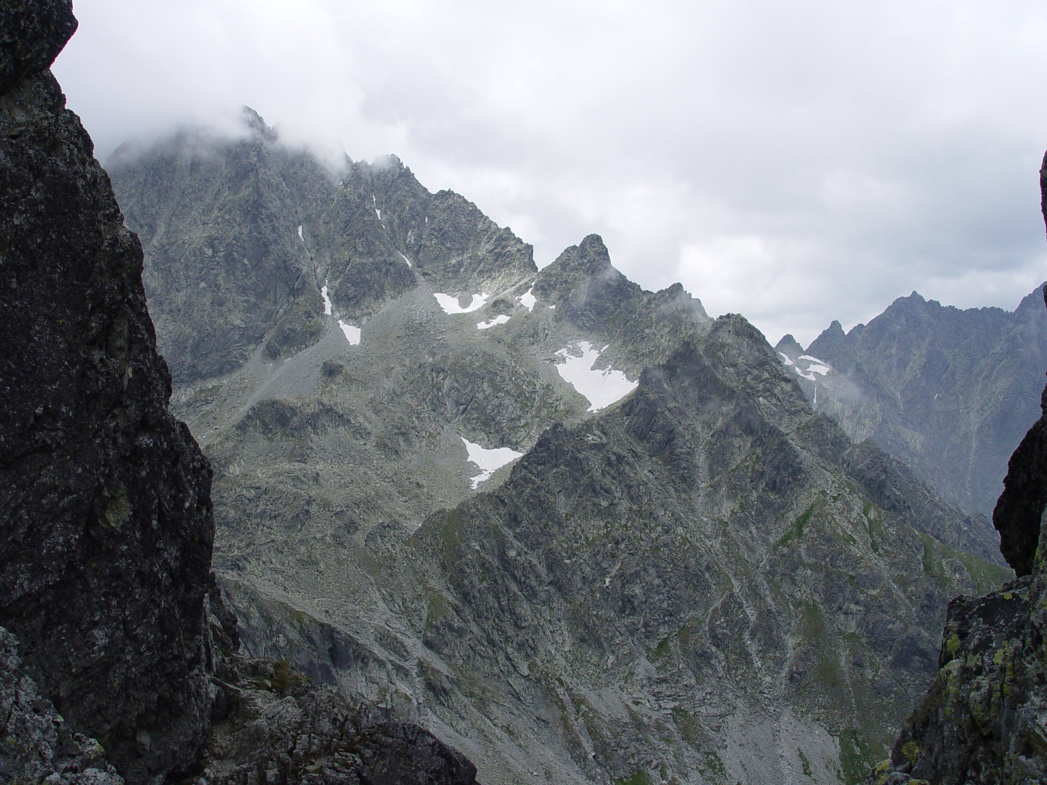 Magas-Tátra,_Rovátkáról_kilátás